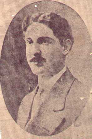 João Evangelista Belfort Duarte, mais conhecido por, Belfort Duarte (São Luís, 27 de novembro de 1883 — Campo Belo, 27 de novembro de 1918) foi um futebolista brasileiro e um dos fundadores da Associação Atlética Mackenzie College, primeiro clube brasileiro verdadeiramente de brasileiros, pois, as grandes equipes na época eram de ingleses como o São Paulo Athletic Club.